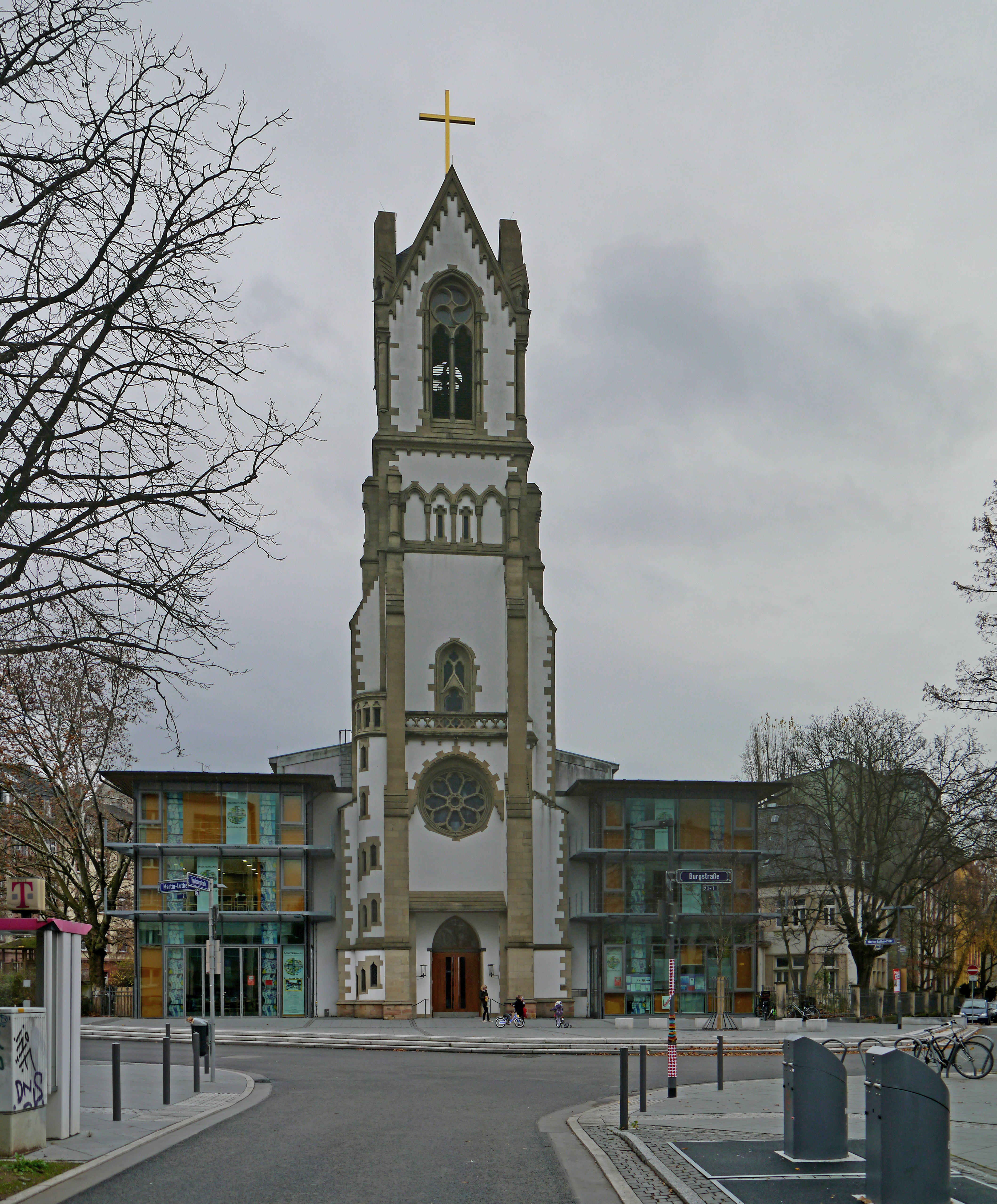 Die Lutherkirche (2012) in Frankfurt-Nordend. Ansicht von West aus der Vogelsbergstrasse.